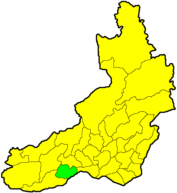 Description Акшинский район на карте Забайкальского краяDate 26 March 2009Source Own workAuthor СафроновАВ Акшинский район на карте Забайкальского края